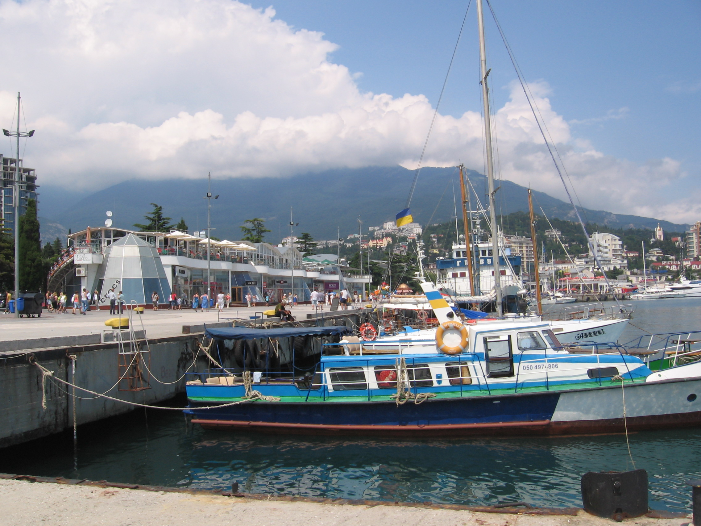 Фото